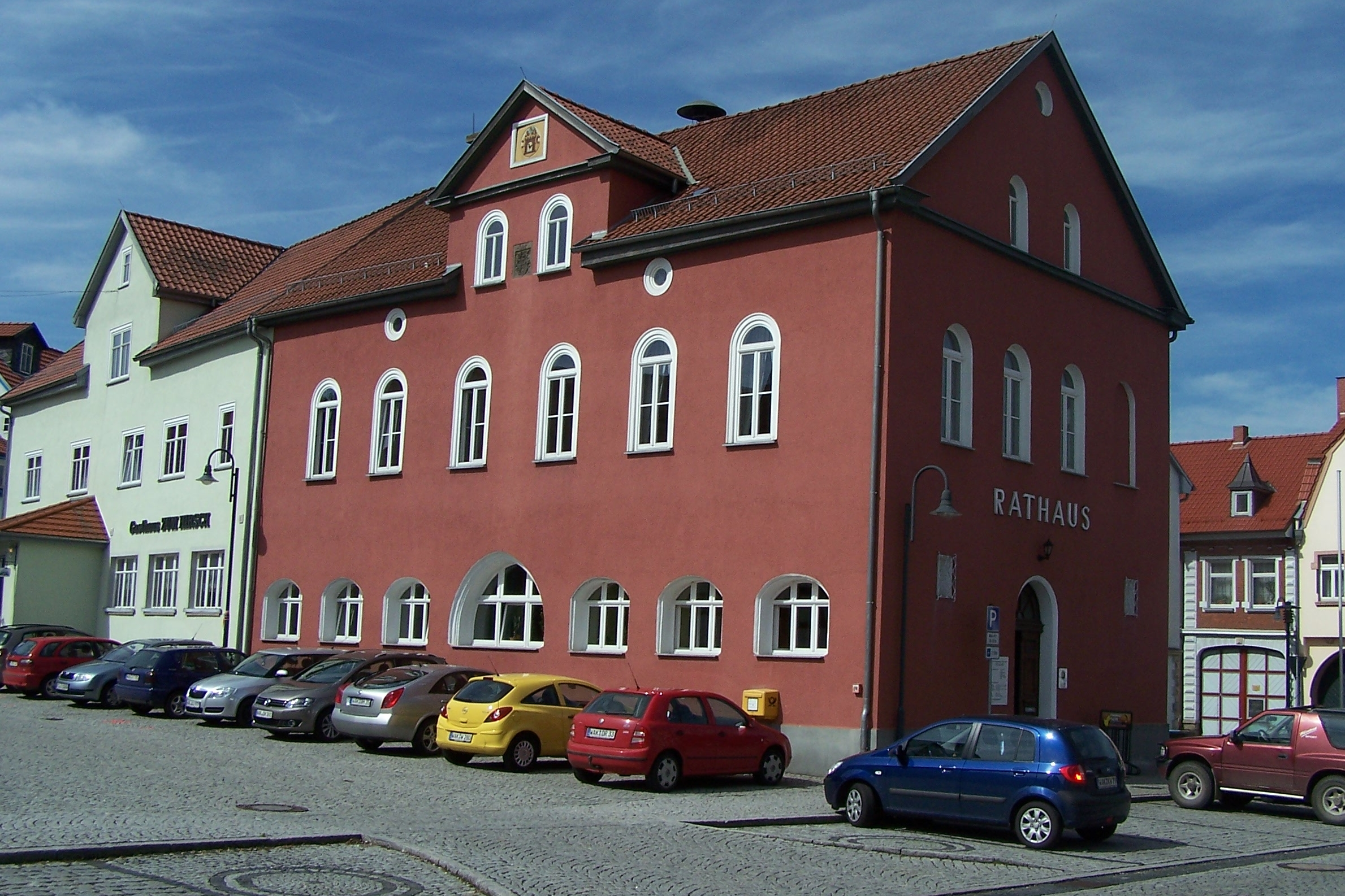 Auch in Kaltennordheim gibt es ein "Rotes Rathaus".